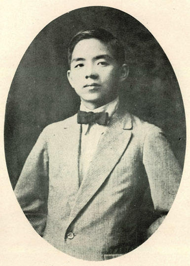 Bân-lâm-gú: Lîm Kéng-jîn 林景仁